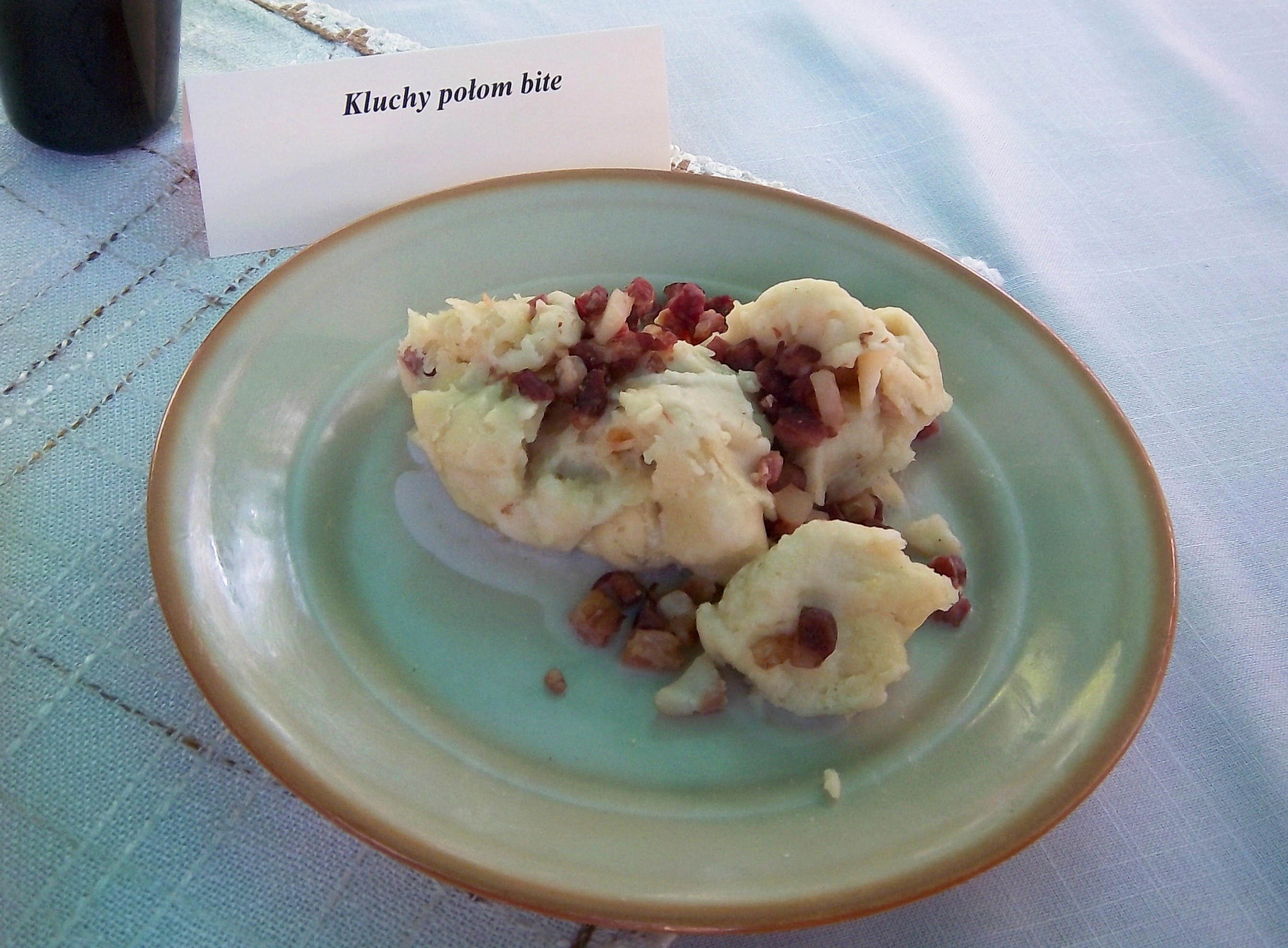 Jarmark Produktów Tradycyjnych w Skansenie i XI edycja Ogólnopolskiego Konkursu „Nasze kulinarne dziedzictwo - smaki regionów""